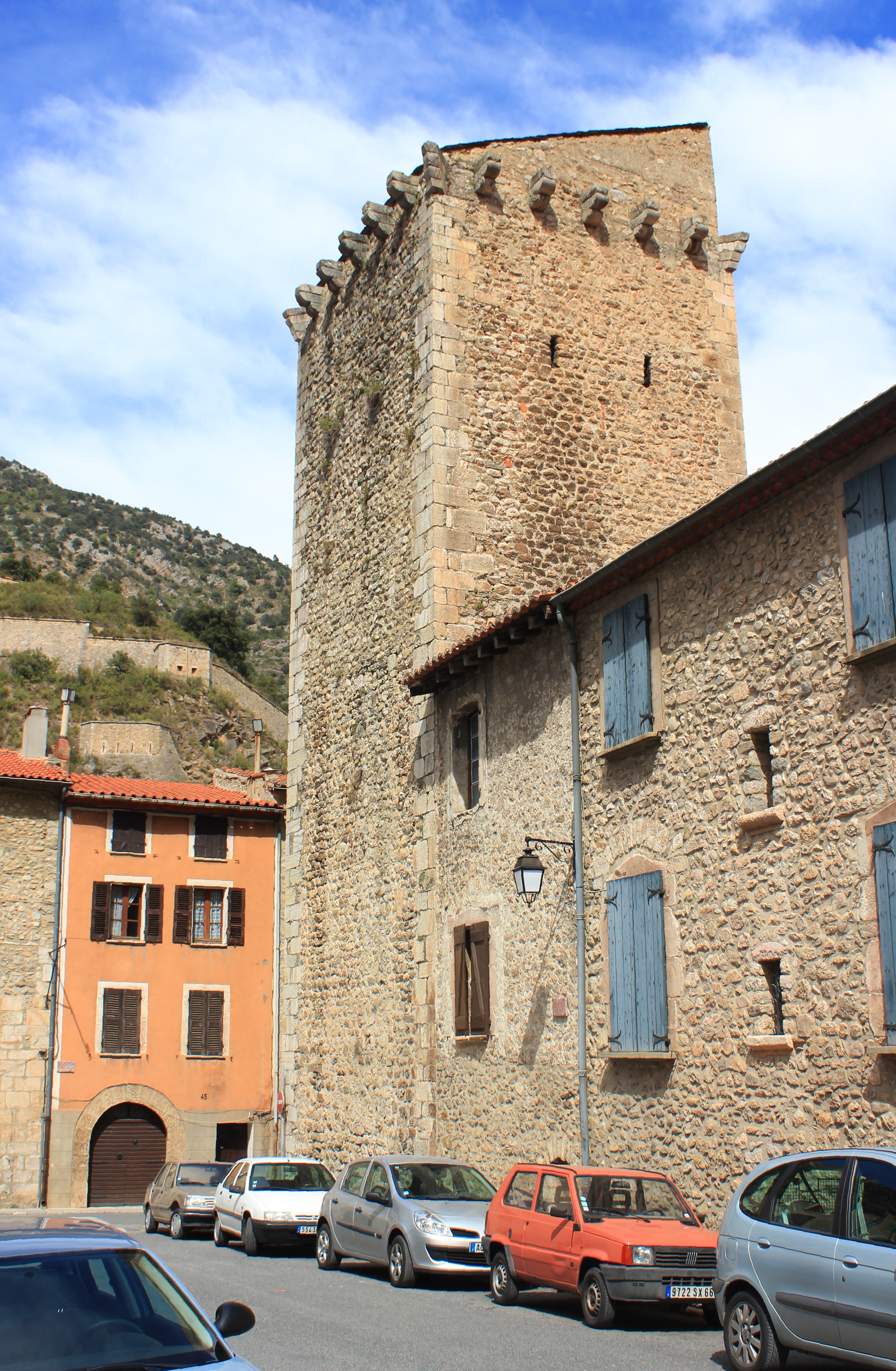 Villefranche-de-Conflent (Pyrénées-Orientales, Languedoc-Roussillon; France) En ville